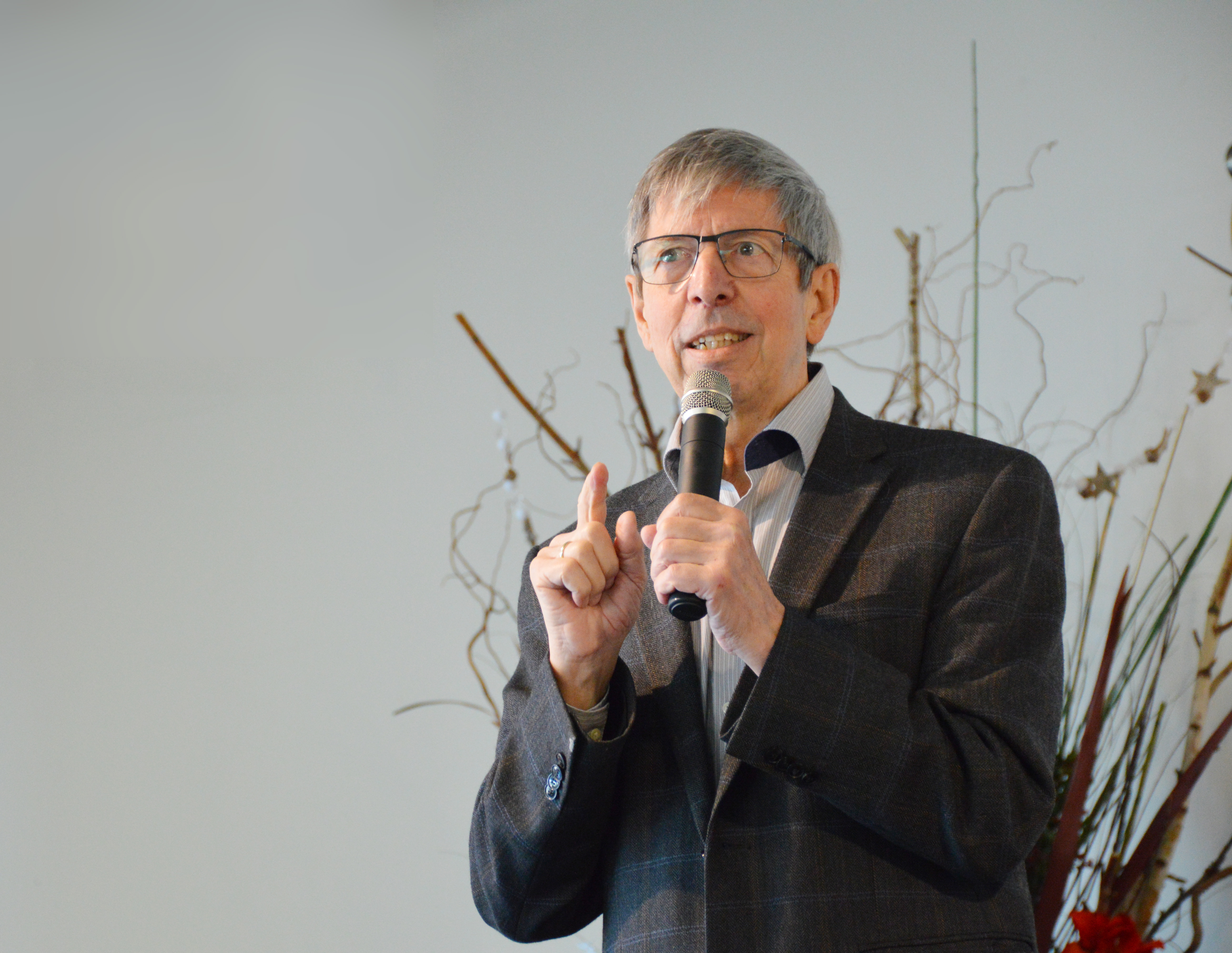 Fred Ritzhaupt bei einer Predigt in der Freien evangelischen Gemeinde Wiesloch-Walldorf